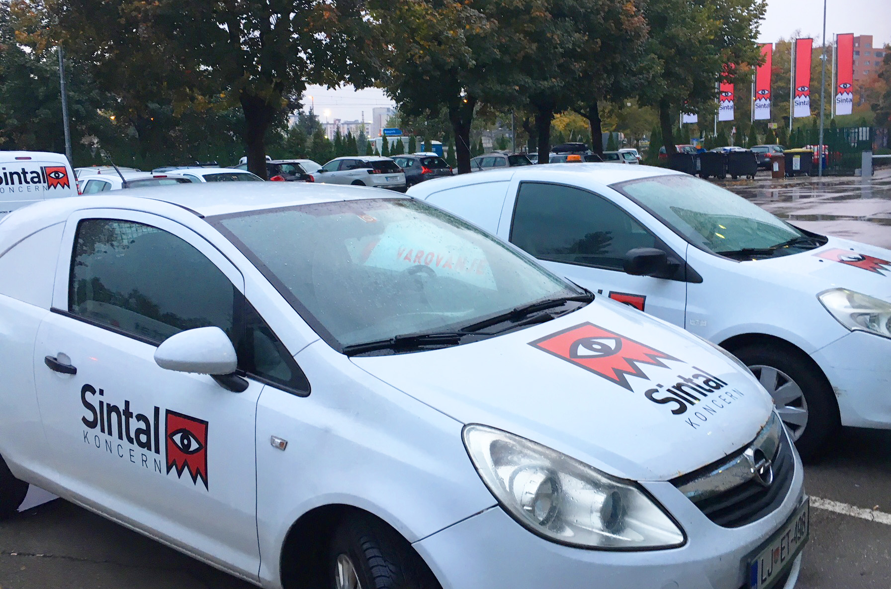 Avtomobili koncerna Sintal. Ljubljana, Litostrojska 38